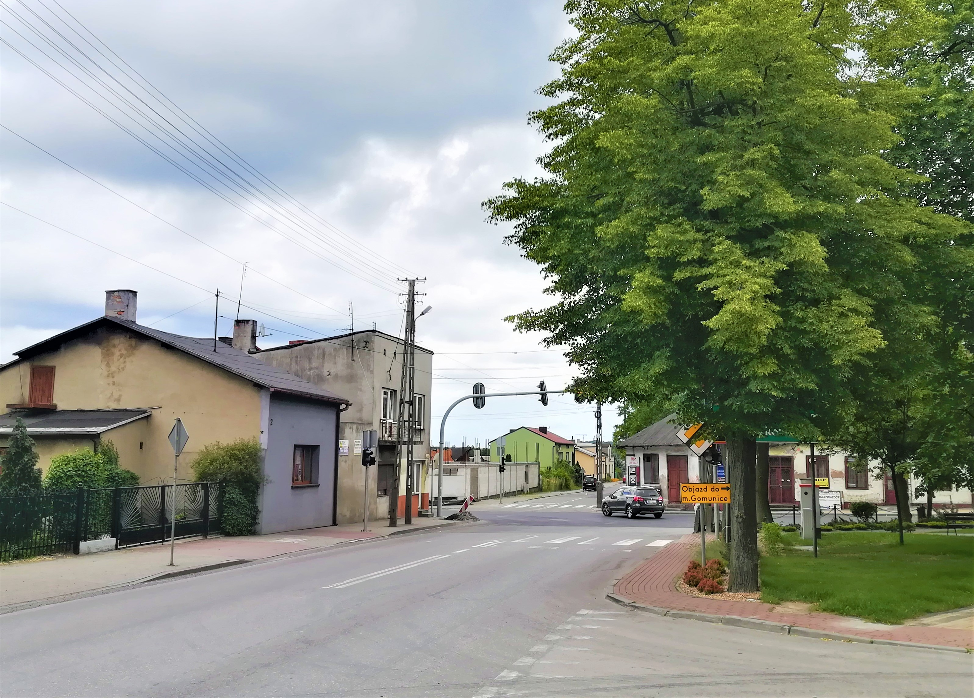 Kamieńsk - rynek i okolice w 2020 r.